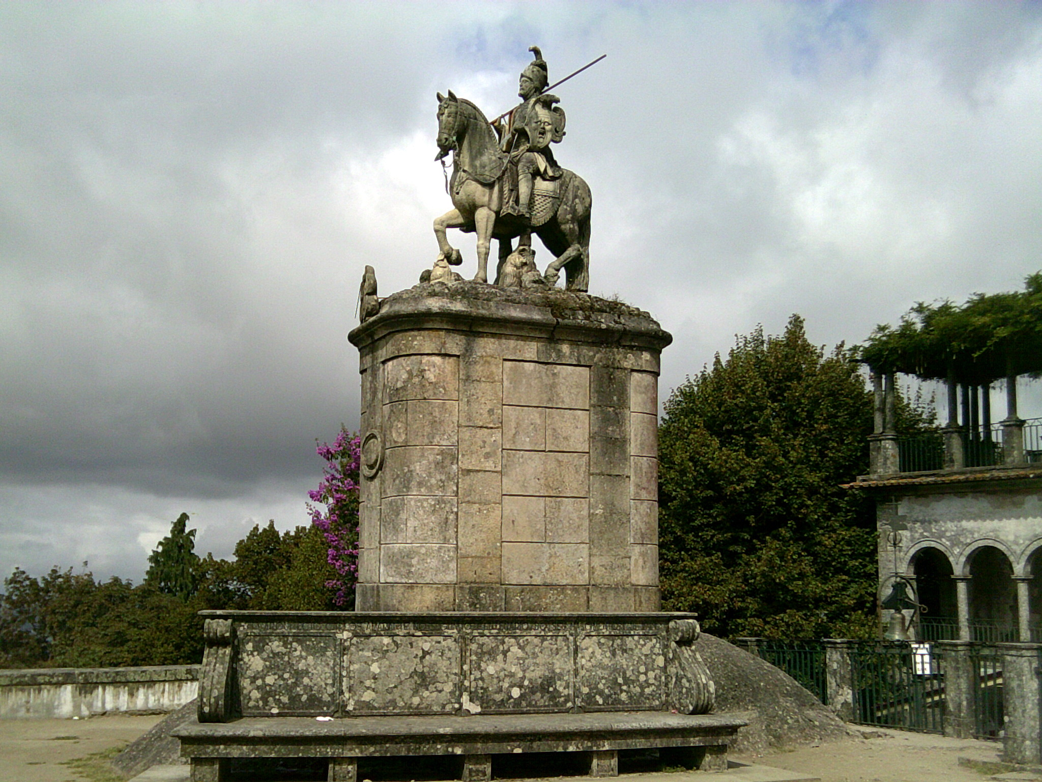 Estátua de São Longuinho, terreiro de Moisés, santuário do Bom Jesus do Monte, Braga, Portugal.